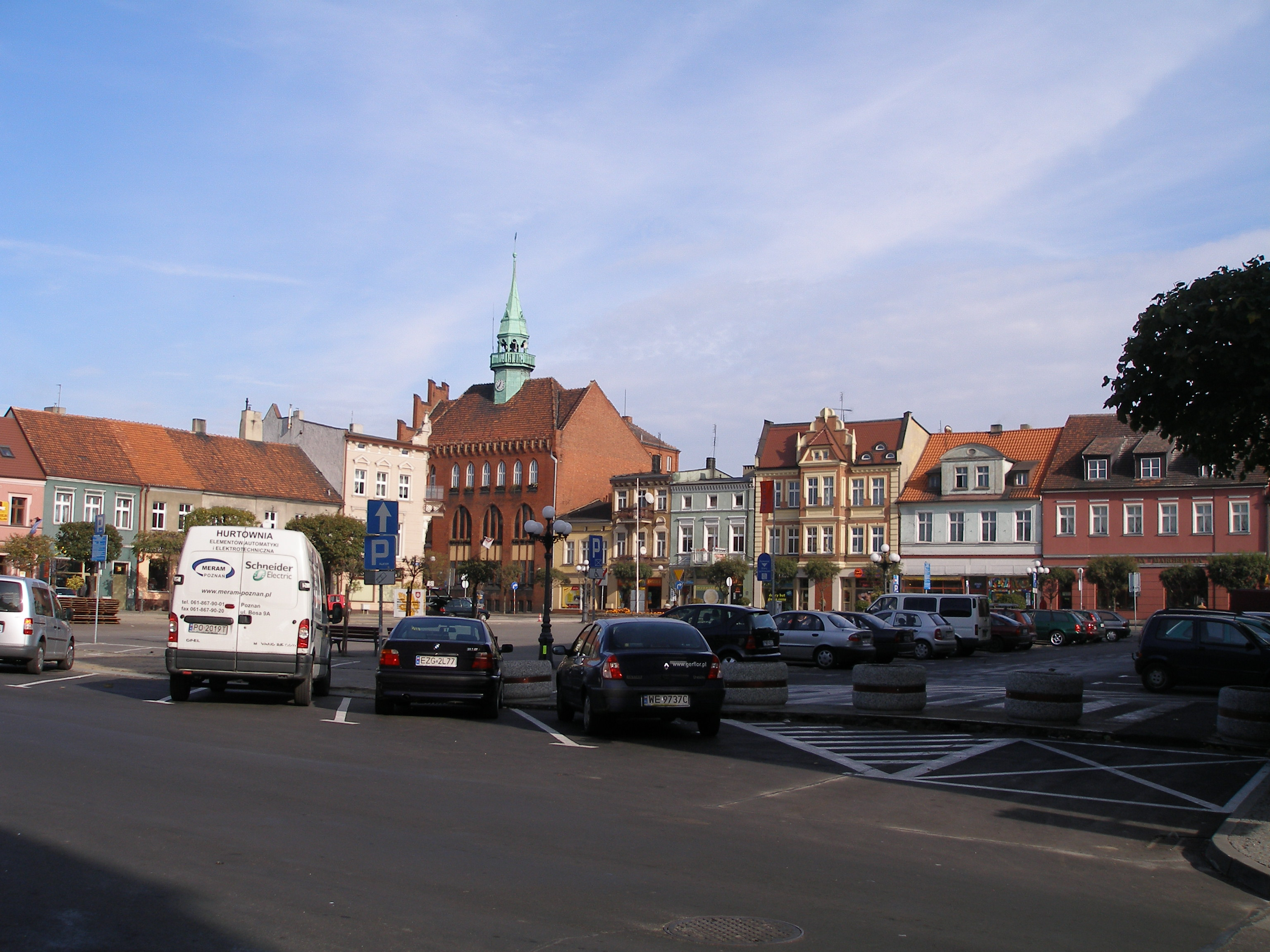 Rynek we Wrześni